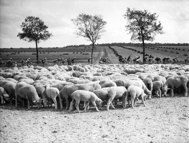 Spaarnestad Photo, SFA001012893 Het peloton passeert een kudde schapen tijdens de rit door het boerenland. Tour de France 1938 (19e etappe Metz-Reims). Collectie SPAARNESTAD PHOTO/Fotograaf onbekend Cyclists passing a herd of sheep (19th stage Metz-Reims). Tour de France 1938. Location unknown. Voor meer informatie en voor meer foto’s uit de collectie van Spaarnestad Photo, bezoek onze Beeldbank: U kunt ons helpen onze kennis van de fotocollecties te verrijken door tags en commentaren toe te voegen. Herkent u mensen of locaties of heeft u een bijzonder verhaal te vertellen bij één van de foto’s, laat dan een reactie achter (als u ingelogd bent bij Flickr) of stuur een mailtje naar: You can help us gain more knowledge on the content of our collection by simply adding a comment with information. If you do not wish to log in, you can write an e-mail to